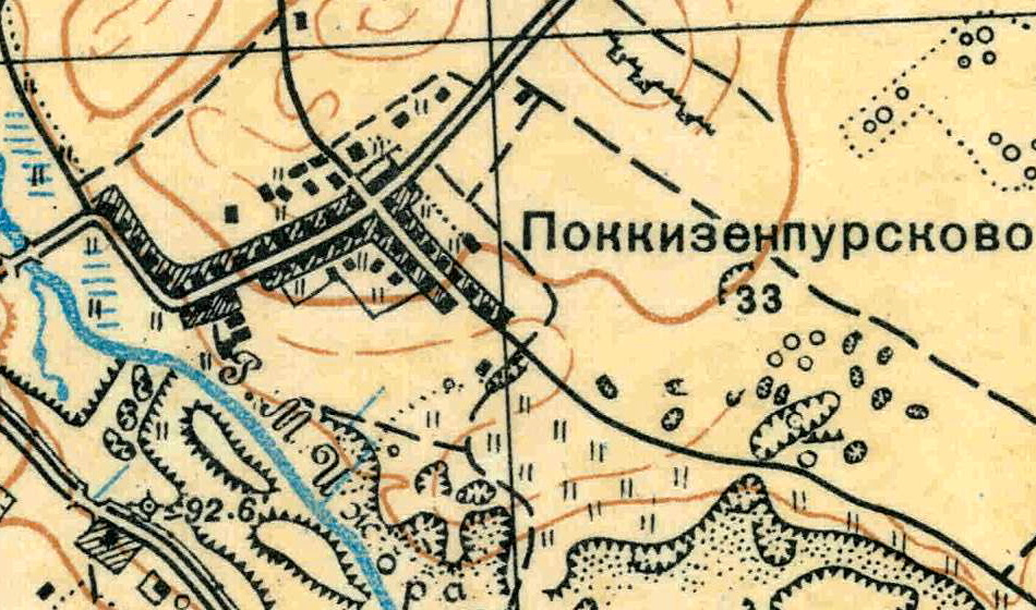 Топографическая карта Ленинградской области, квадрат О-36-13-А-а (Большая Пудость), деревня Поккизен-Пурская